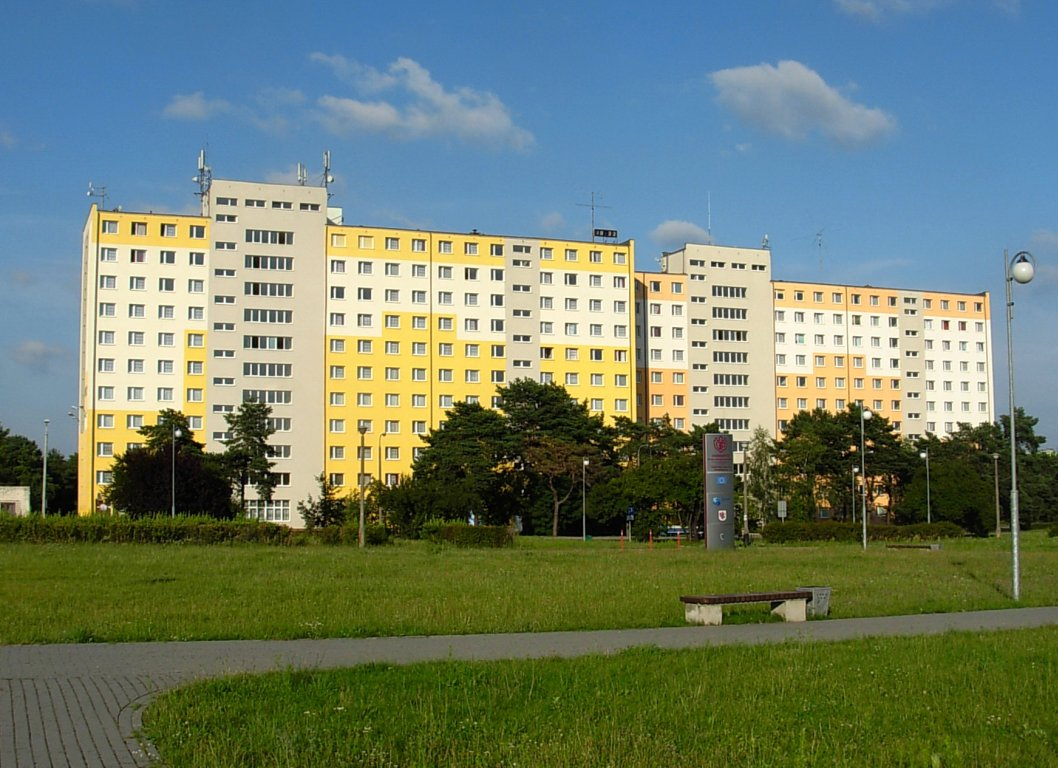 Uniwersytet Technologiczno-Przyrodniczy w Bydgoszczy - domy studenckie